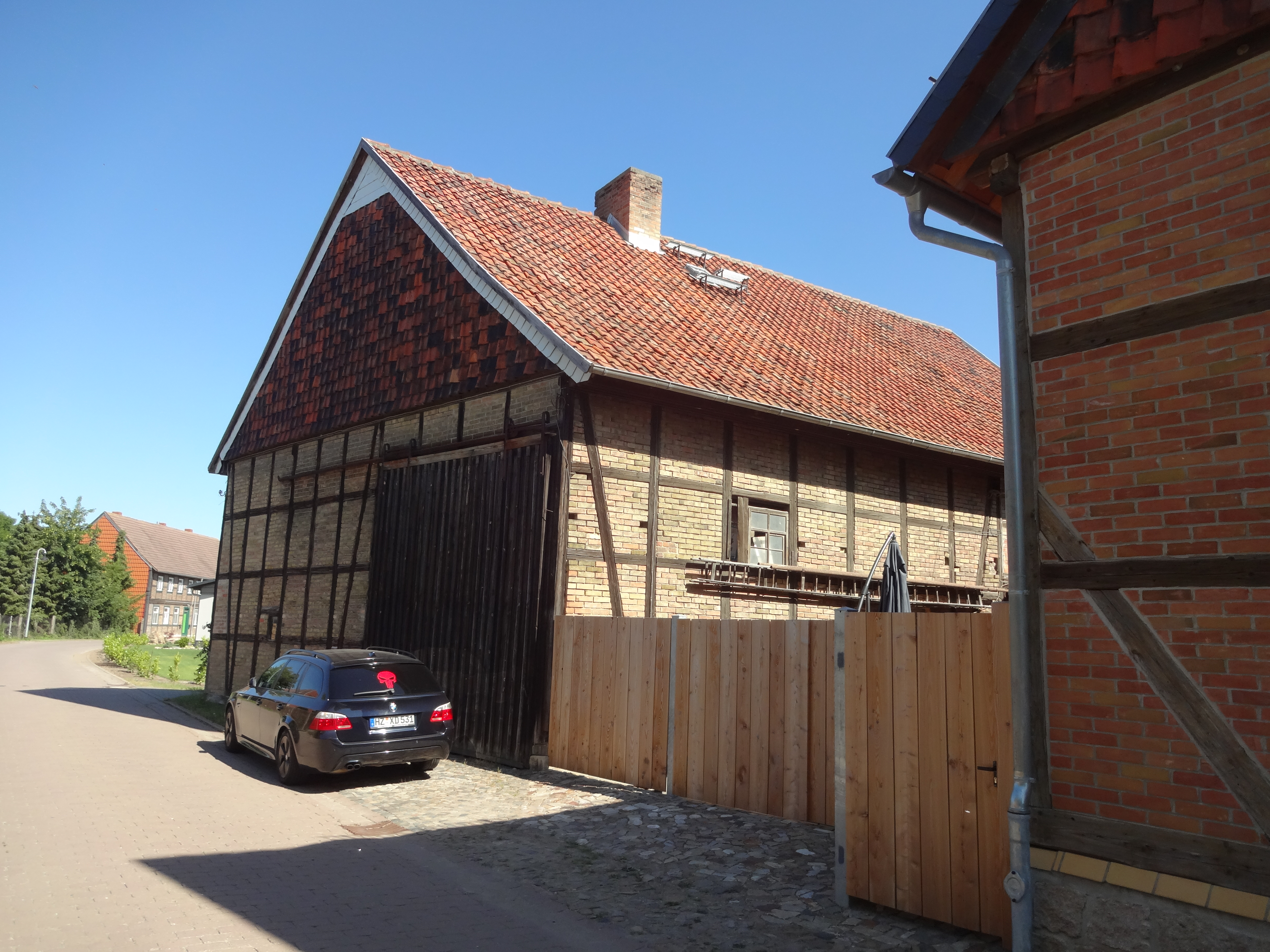 denkmalgeschütztes Wohnhaus in der Faktoreistraße 4 in Langeln, Gemeinde Nordharz